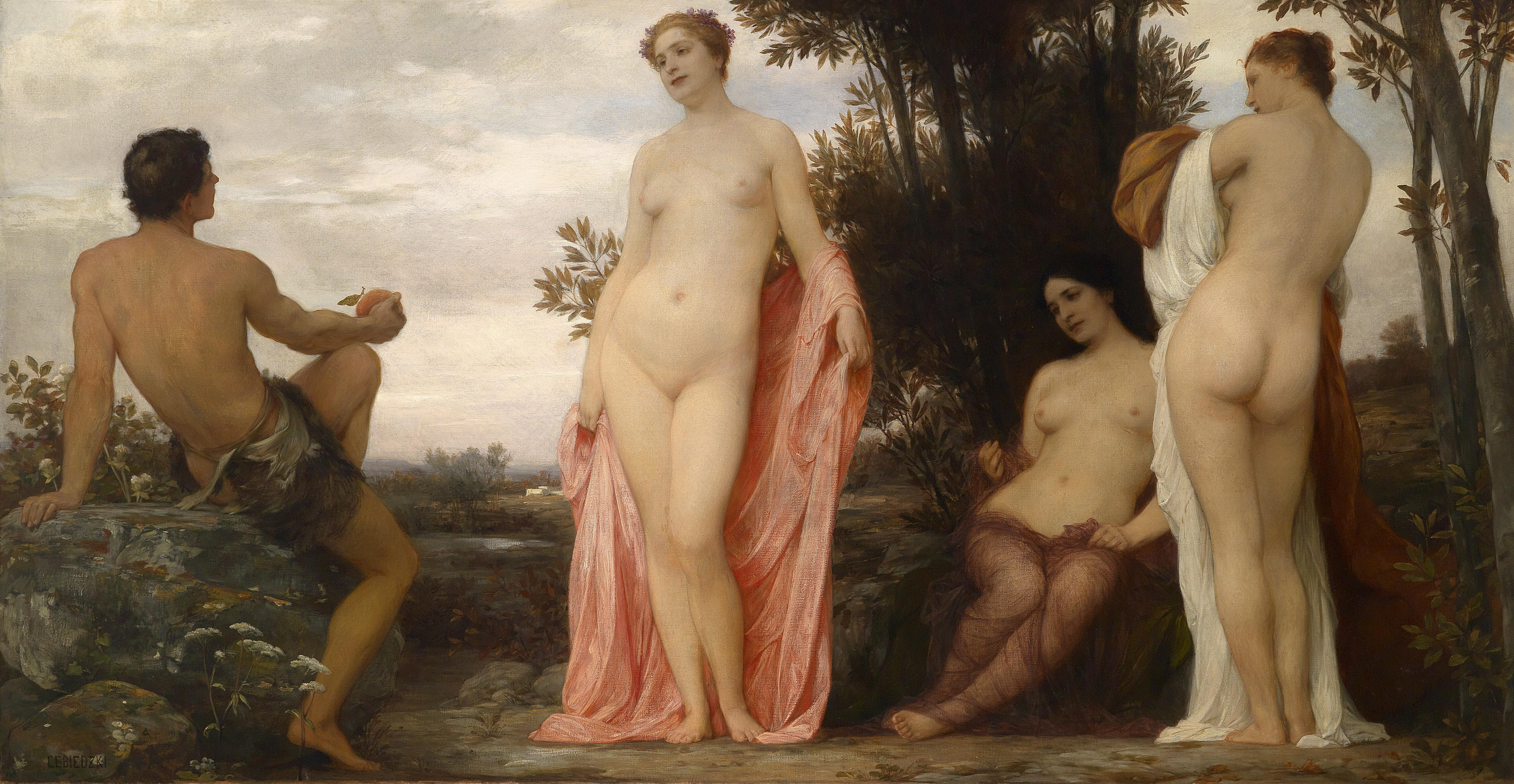 Das Urteil des Paris, signiert Lebiedzki, Öl auf Leinwand, 101,5 x 193 cm. Auf der Rückseite Klebezettel: Associazione degli Artisti Italiani, II. Esposizione 1906-1907 Firenze-Via dei Bardi, 25